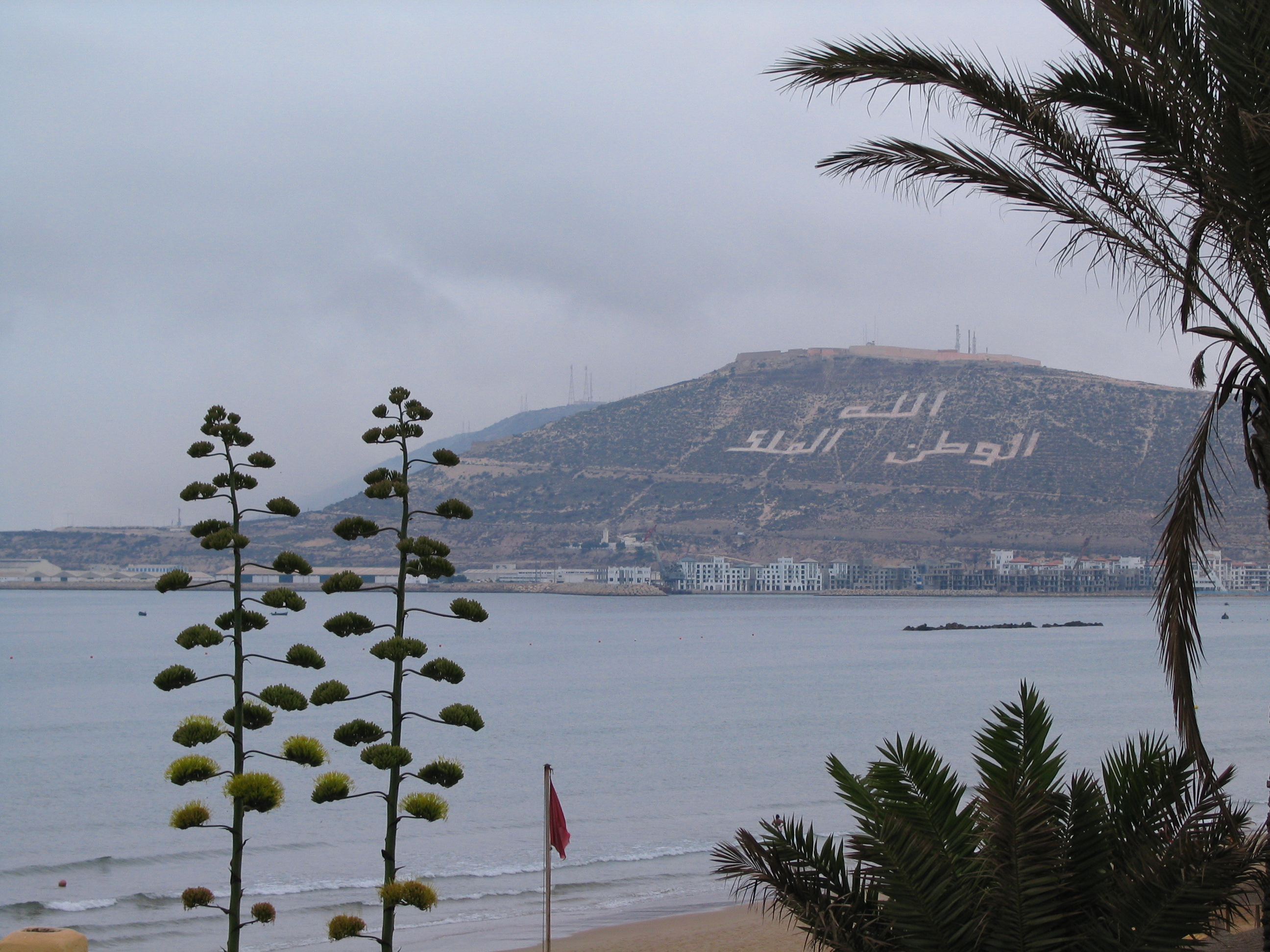 Agadir (Maroc), la Kasbah